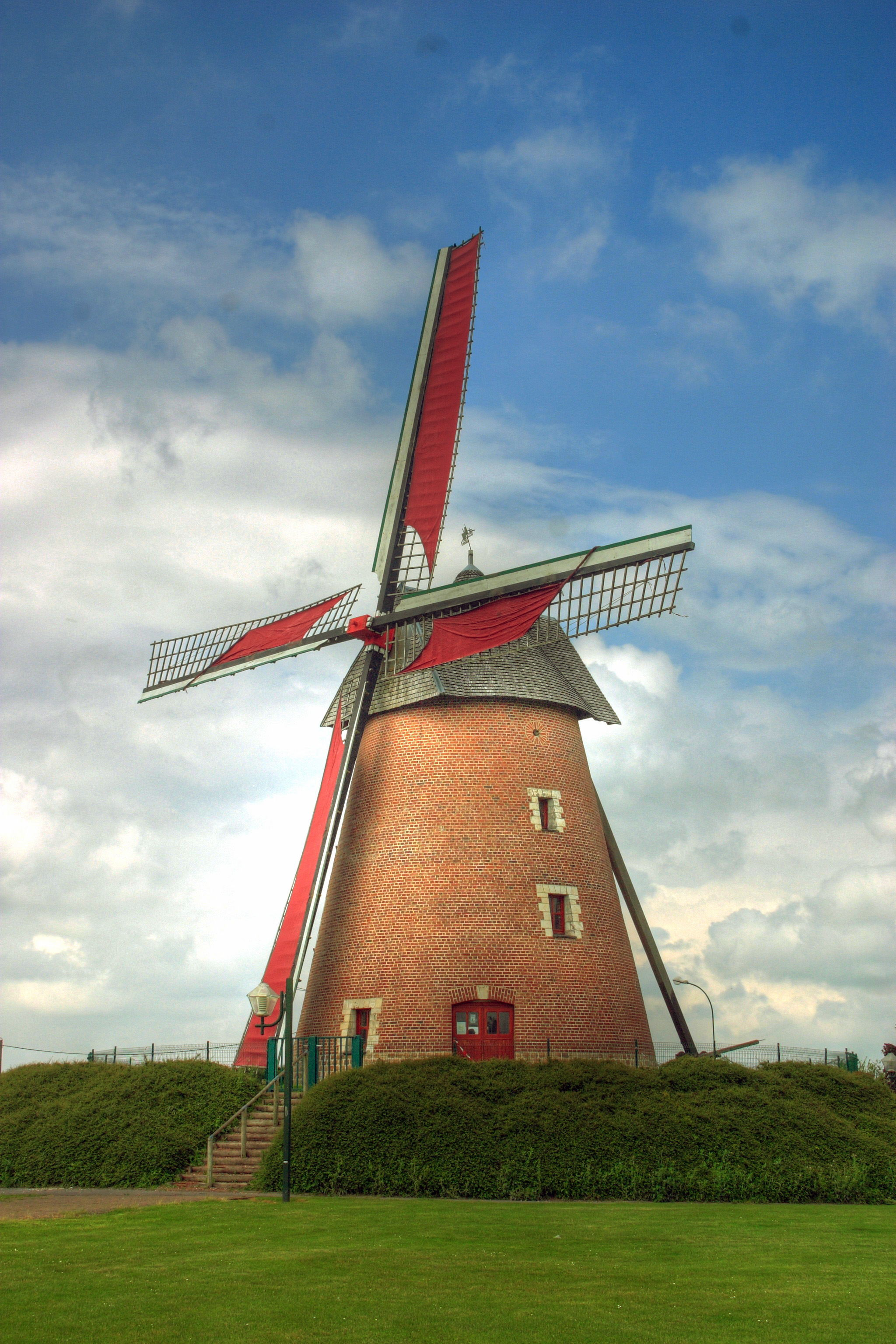 Le moulin d'Achicourt